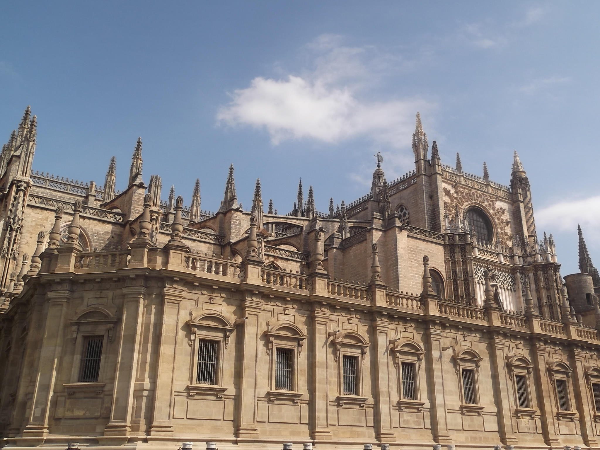 كاتدرائية إشبيلية من الخارج.